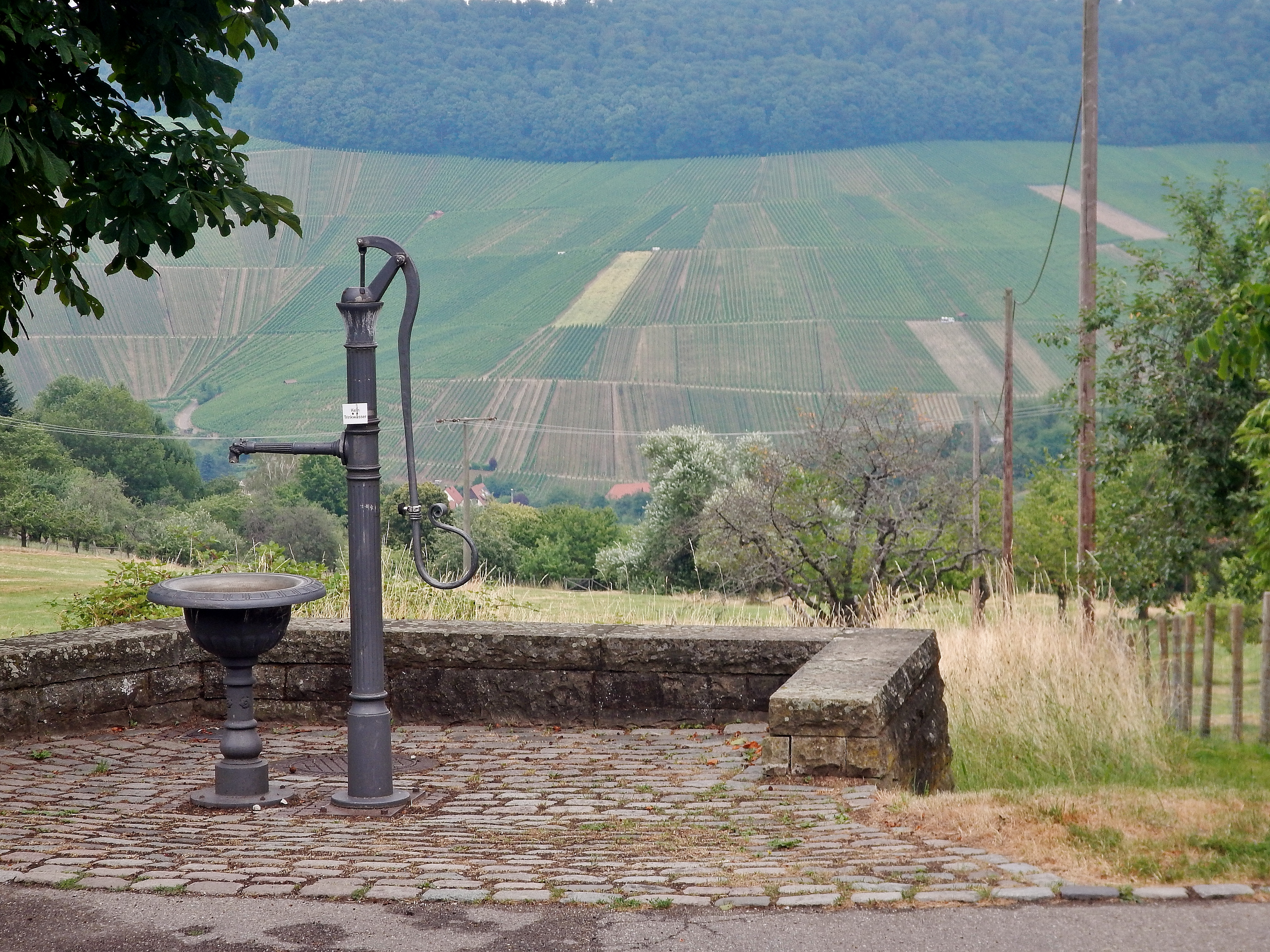 Brunnen (kein Trinkwasser) an dem im Oktober 2010 eingeweihten 226 km langen Remstal-Höhenweg